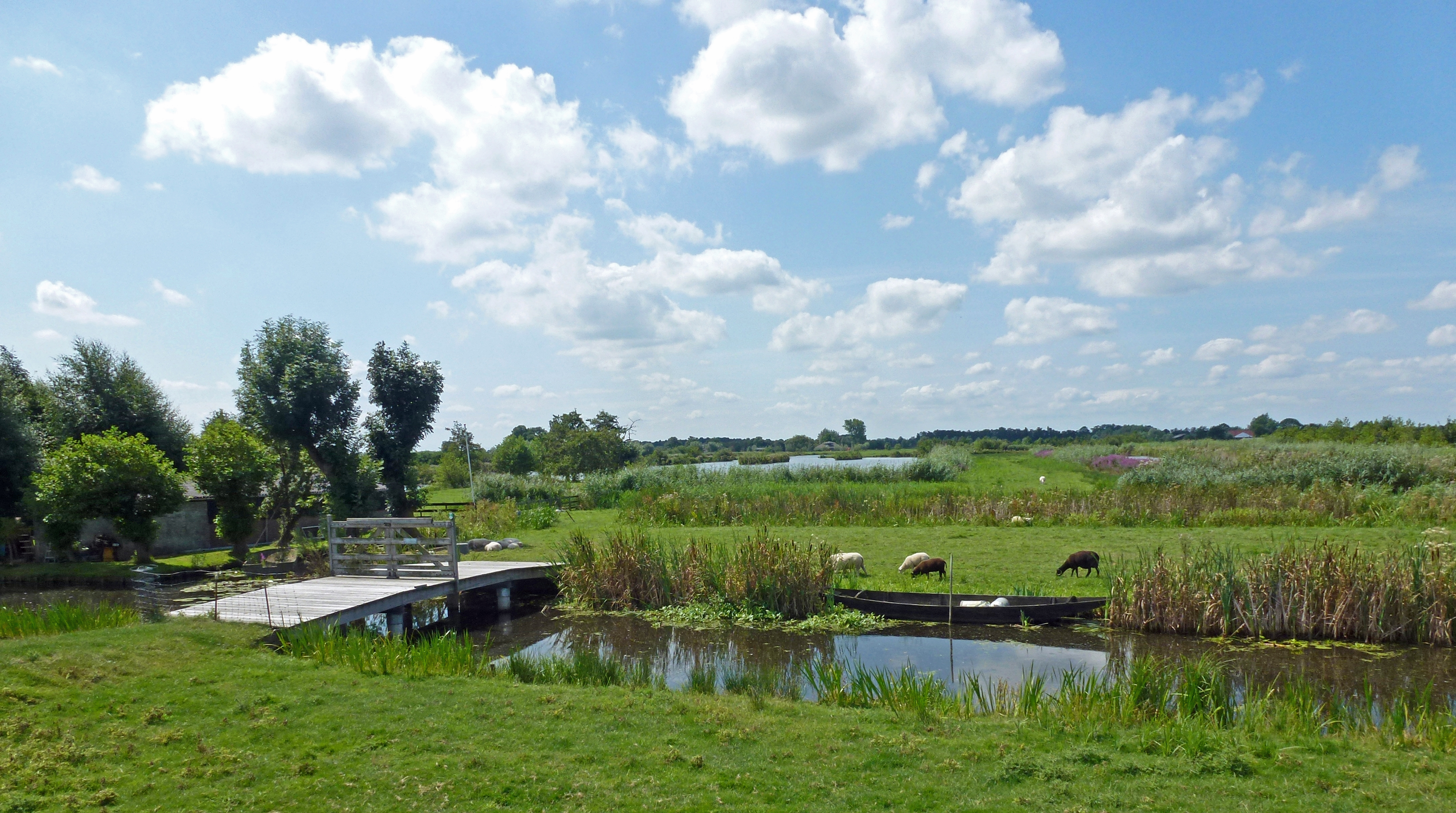 Natuurgebied, afgebroken vervening. De toegang tot dit natuurgebied bevindt zich aan de Oukoopsekade, het pad loopt naar de Oukoopse molen, daar naast ligt de Put van Kruijt. De Put is genoemd naar de eigenaar de heer Kruijt. Het gebied waarin de Put van Kruijt zich bevindt, behoort tot het cultureel erfgoed van de provincie Zuid-Holland. De dijk waaraan de Put ligt heet de Prinsendijk die langs de Enkele Wiericke ligt welke onderdeel is van de Oude Hollands Waterlinie. (Bron:Het informatiebord ter plaatse van StaatsBosbeheer)